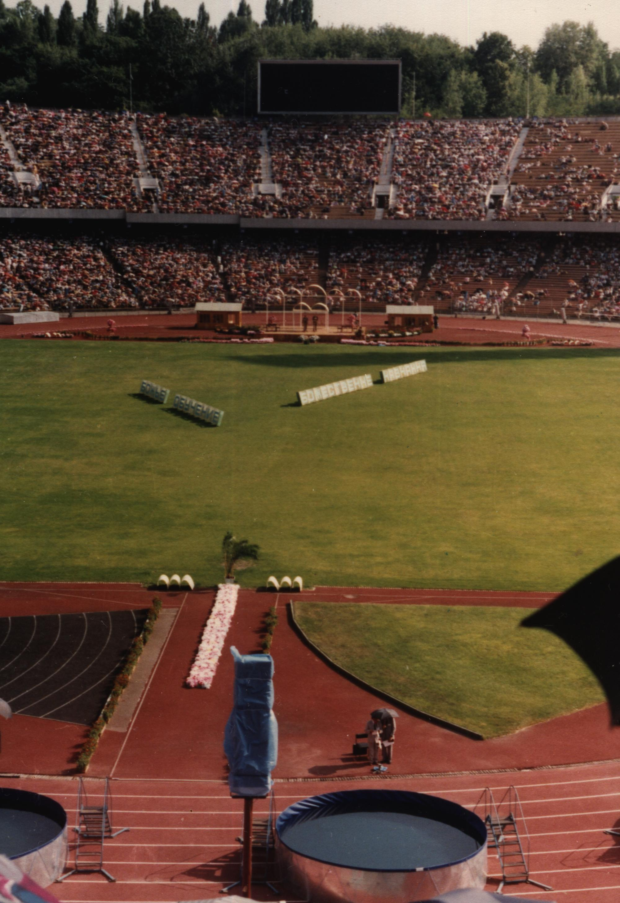 Zgromadzenie międzynarodowe Świadków Jehowy w Kijowie na Ukrainie w 1993 roku. Scena rosyjskojęzyczna i ukrainskojęzyczna.